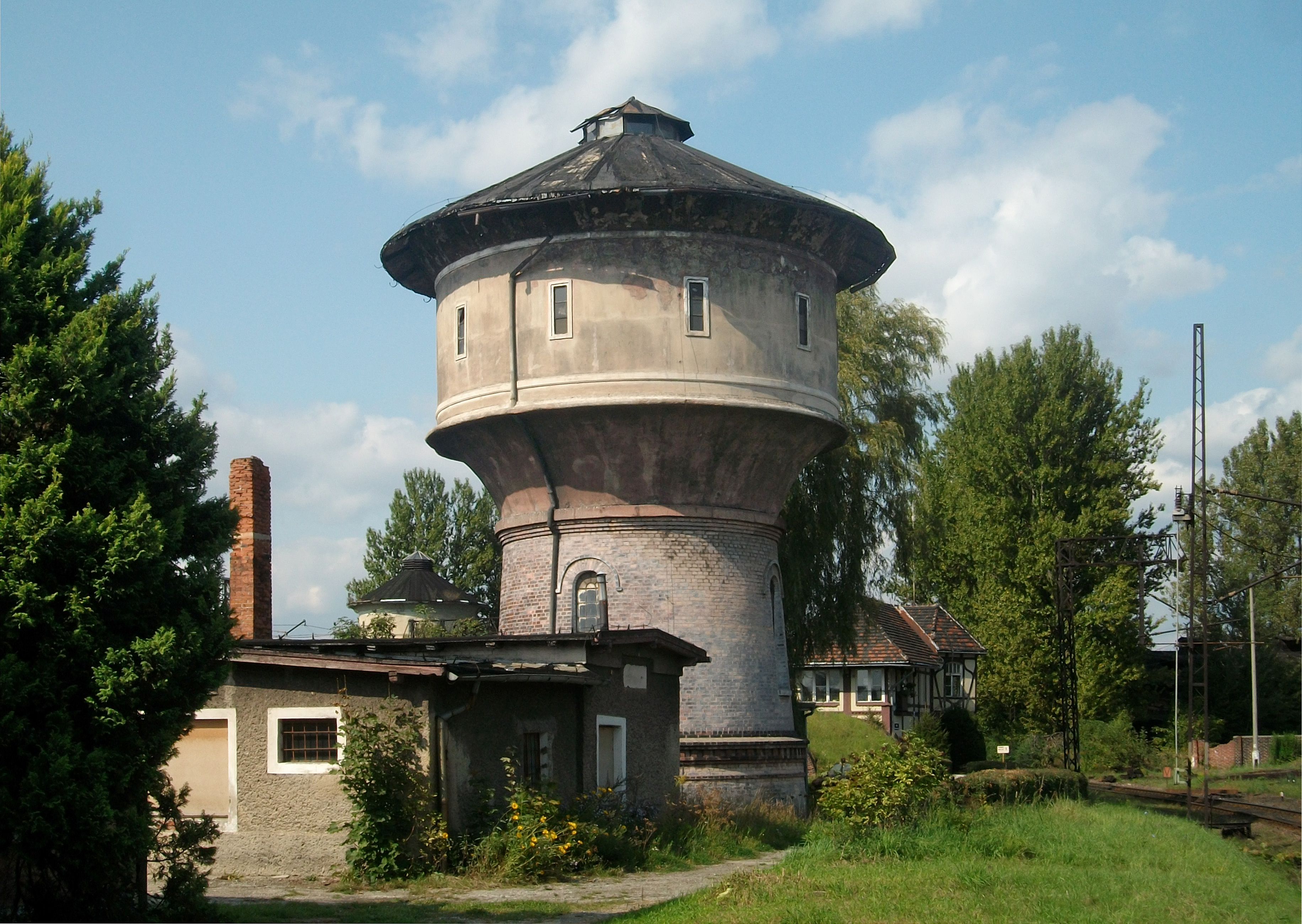 Kłodzko Główne – wieża ciśnień nr 2.